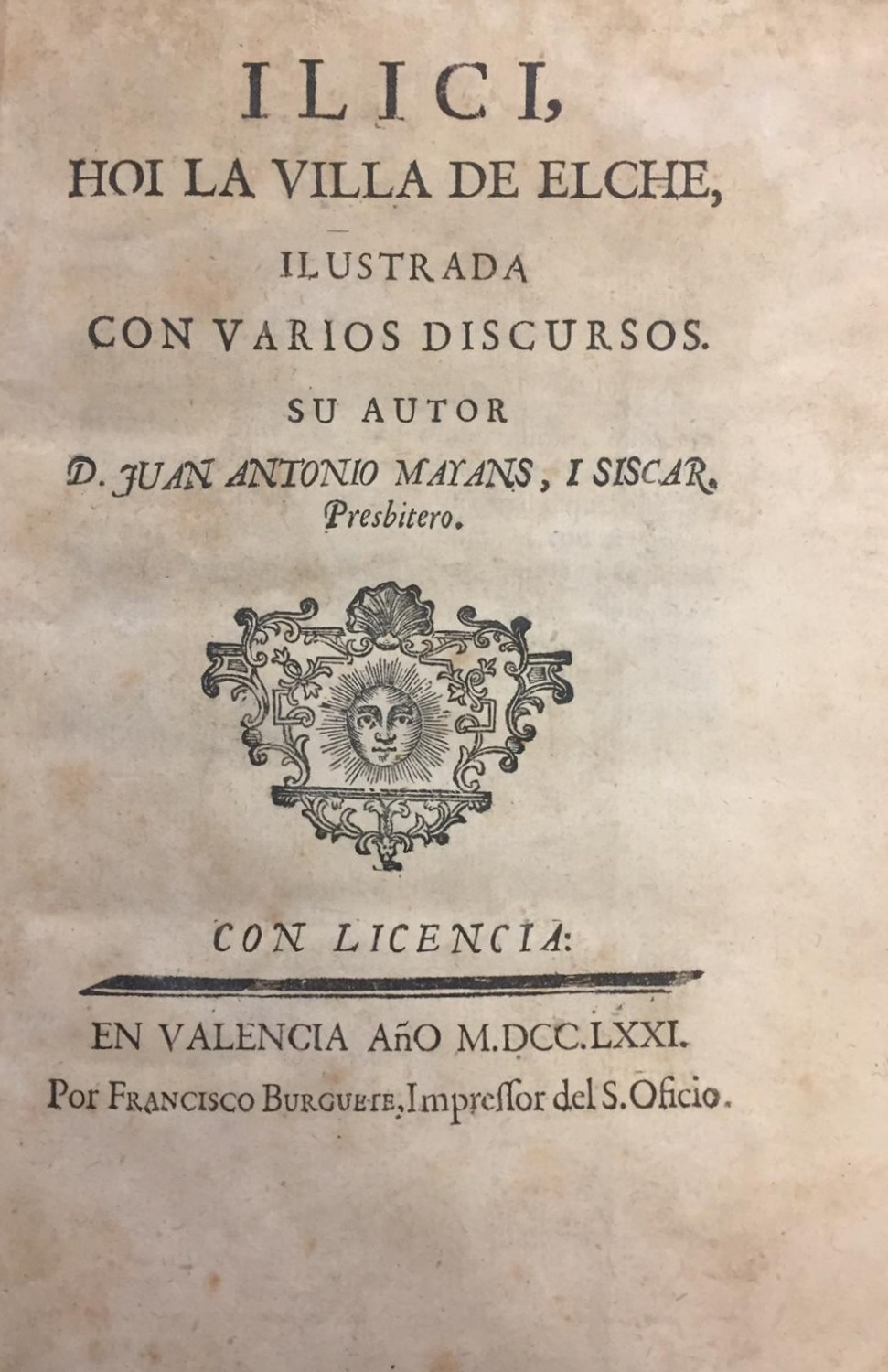 "Ilici, hoi la villa de Elche, ilustrado con varios discursos", de Juan Antonio Mayáns y Siscar (1771).